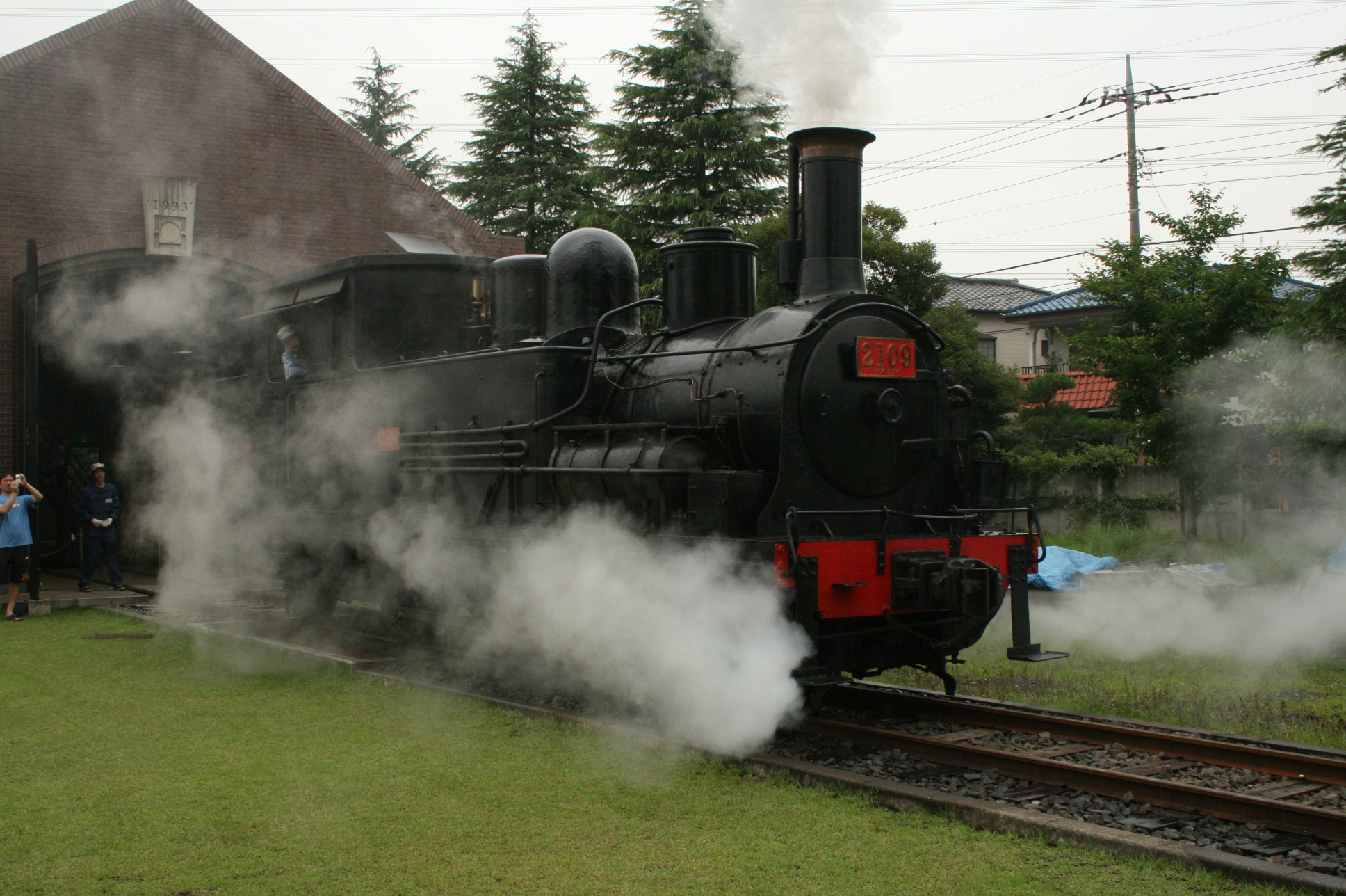 Kokutetsu type 2100-2109